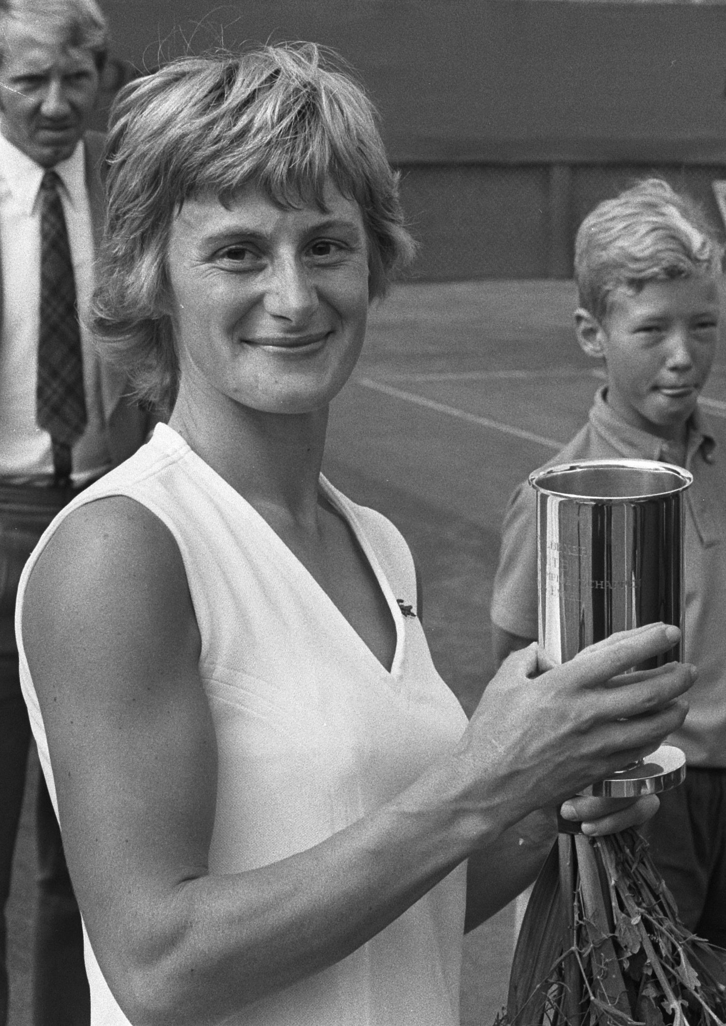 Collectie / Archief : Fotocollectie Anefo Reportage / Serie : [ onbekend ] Beschrijving : Nederlandse tenniskampioenschappen 1971 Scheveningen. Staatssecretaris van Sport, H. Vonhoff, reikt beker uit aan Marijke Schaar-Jansen Datum : 15 augustus 1971 Locatie : Scheveningen, Zuid-Holland Trefwoorden : sport, staatssecretarissen, tennis Persoonsnaam : Schaar-Jansen, Marijke, Vonhoff, Henk Fotograaf : Punt, […] / Anefo Auteursrechthebbende : Nationaal Archief Materiaalsoort : Negatief (zwart/wit) Nummer archiefinventaris : bekijk toegang 2.24.01.05 Bestanddeelnummer : 924-8176